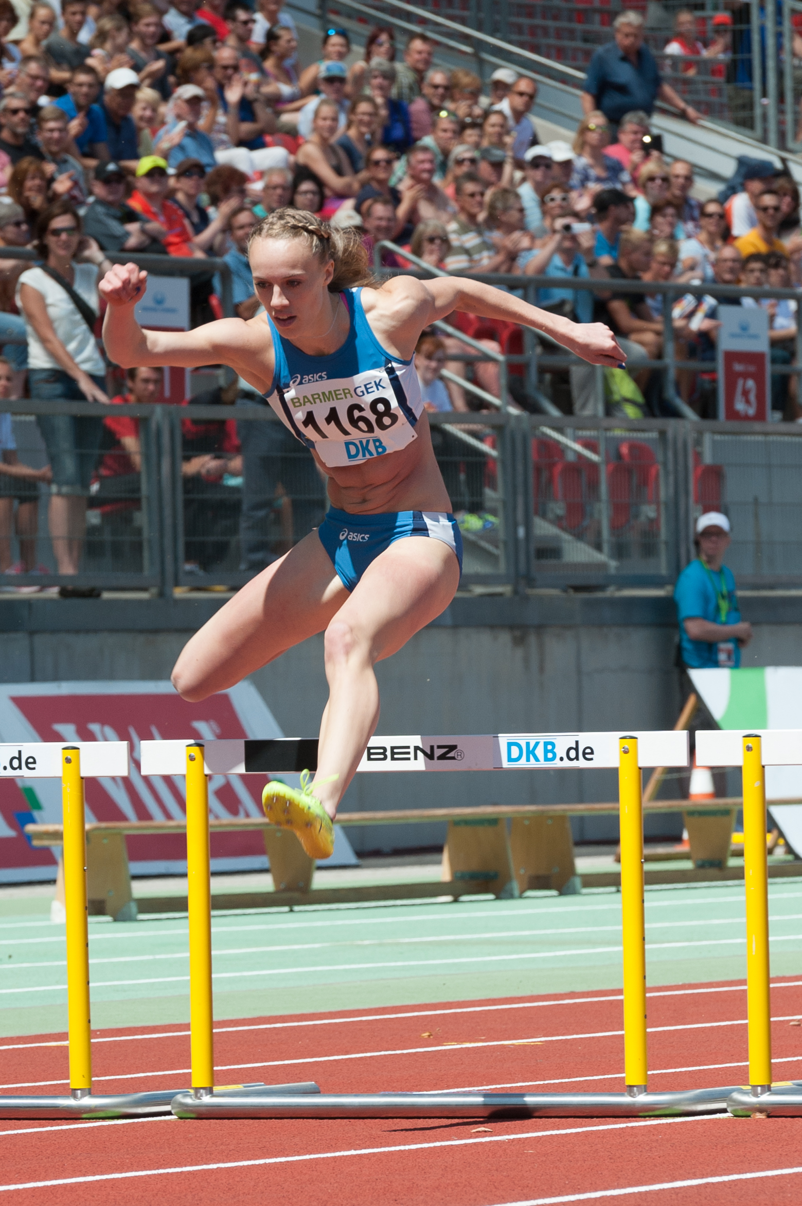 Deutsche Leichtathletik-Meisterschaften 2015: FRauen 400m Hürden - Jackie Baumann, LAV Stadtwerke Tübingen